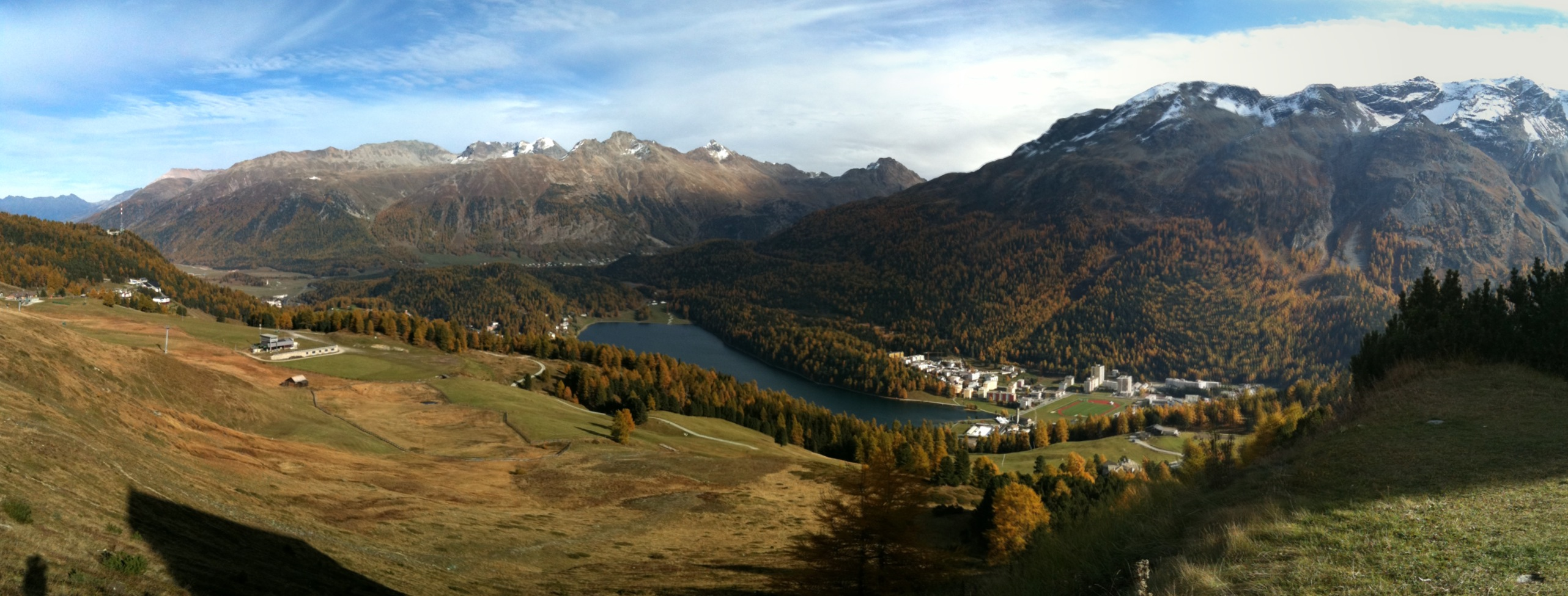 St. Moritz (von der Corviglia aus gesehen)